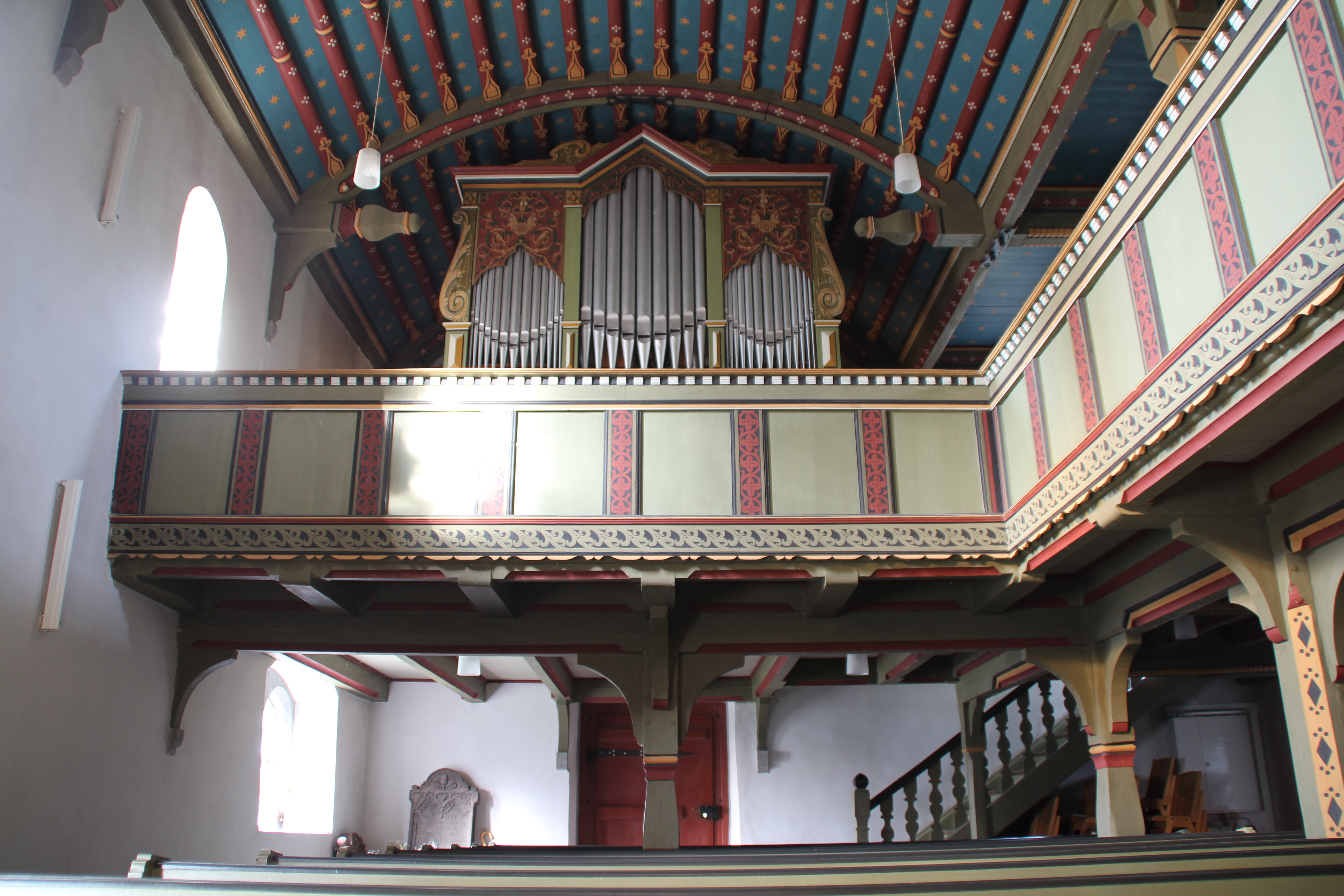 Orgel der Ev. Kirche Winnen, Allendorf/Lumda, Landkreis Gießen, Hessen, Deutschland